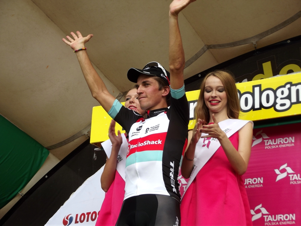 Zdjęcie zrobione podczas IV etapu 70. jubileuszowego Tour de Pologne w Katowicach.